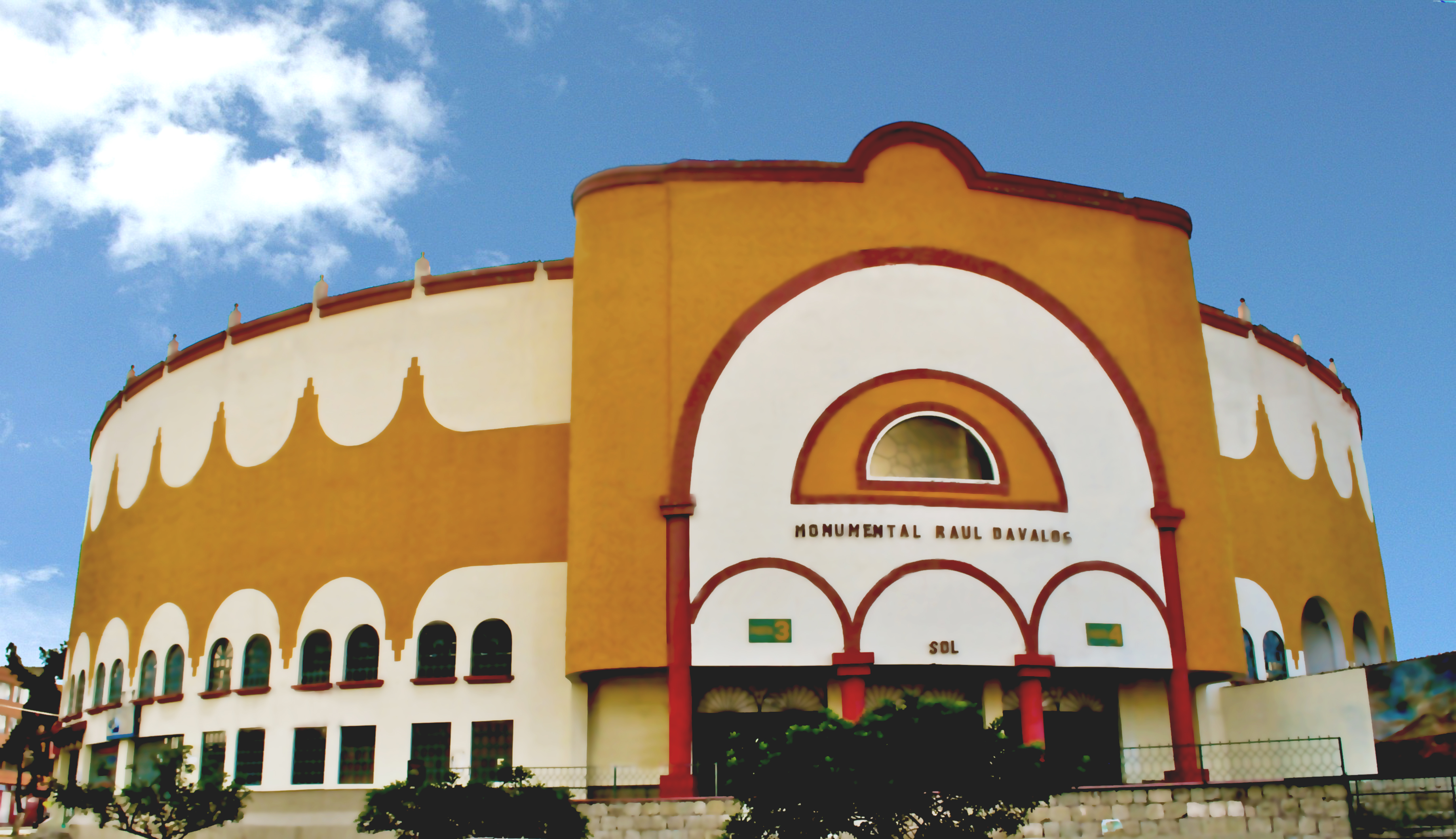 Fotografía de la Plaza de Toros Raúl Dávalos, Riobamba - Ecuador